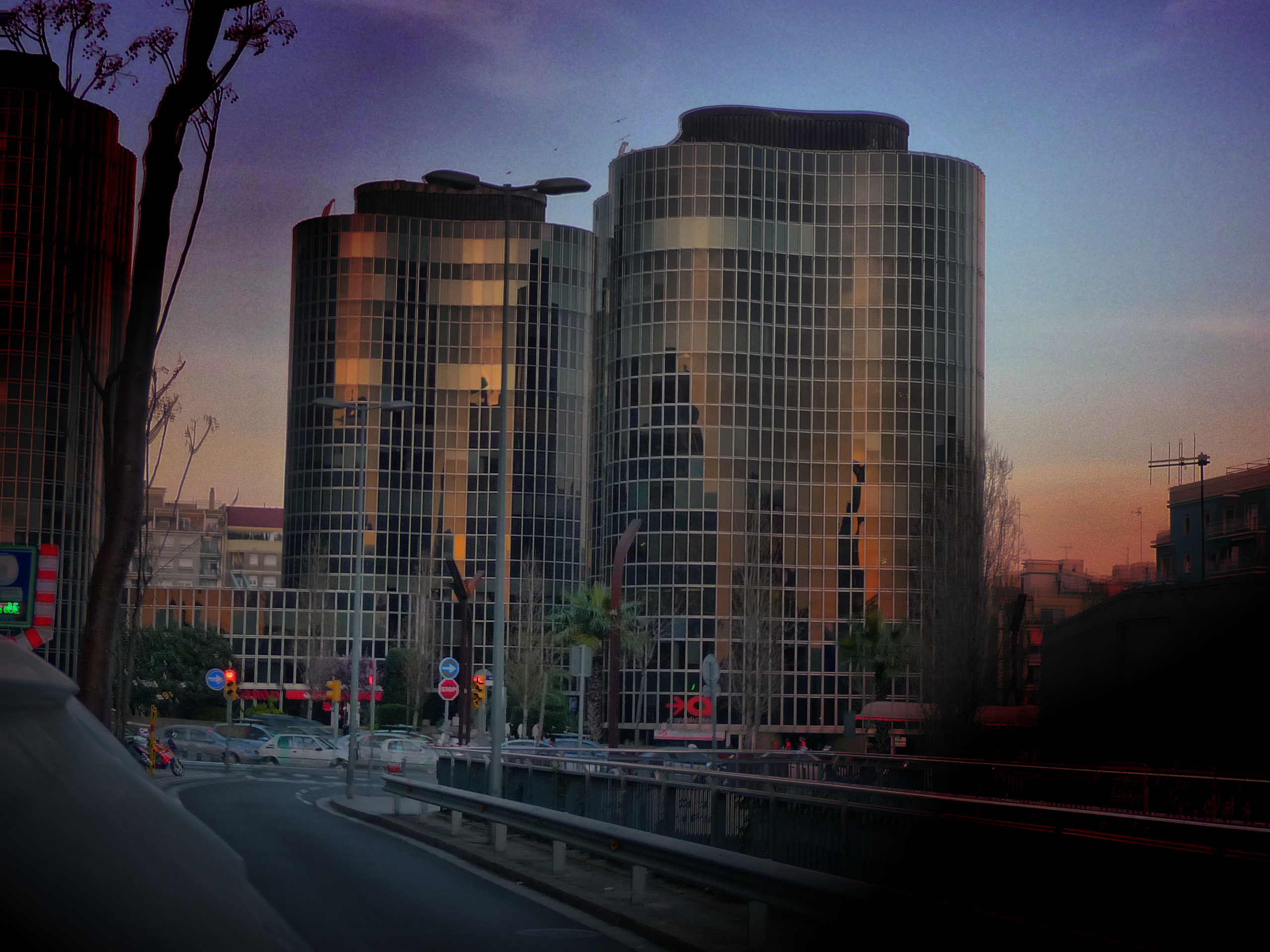 c